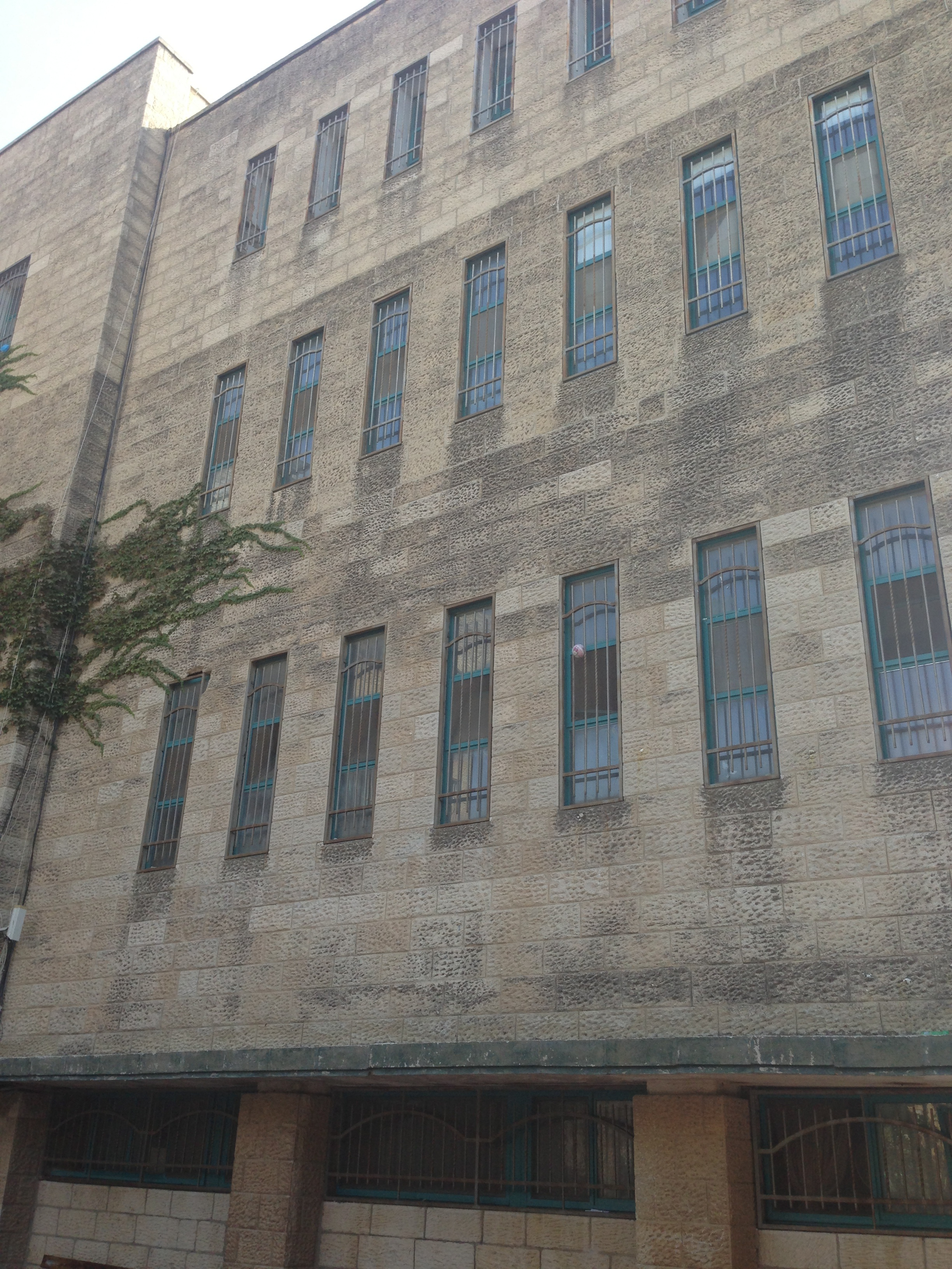 בית צעירות מזרחי היה מוסד חינוכי בירושלים לנערות שעלו לארץ ישראל במסגרת עליית הנוער. נקרא כיום תיכון אמי"ת של רשת אמי"ת.